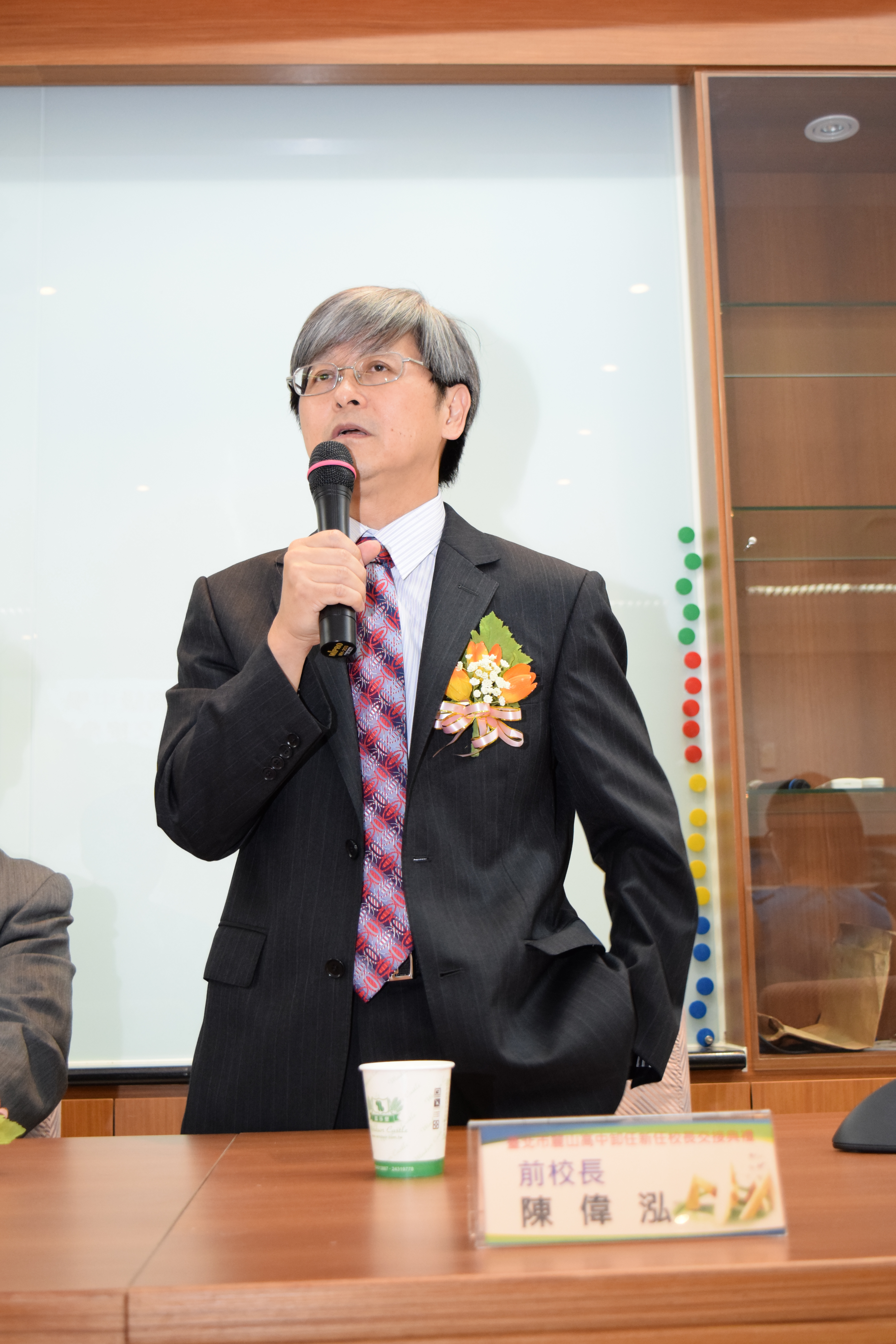 麗山第二任校長陳偉泓，攝於麗山高中